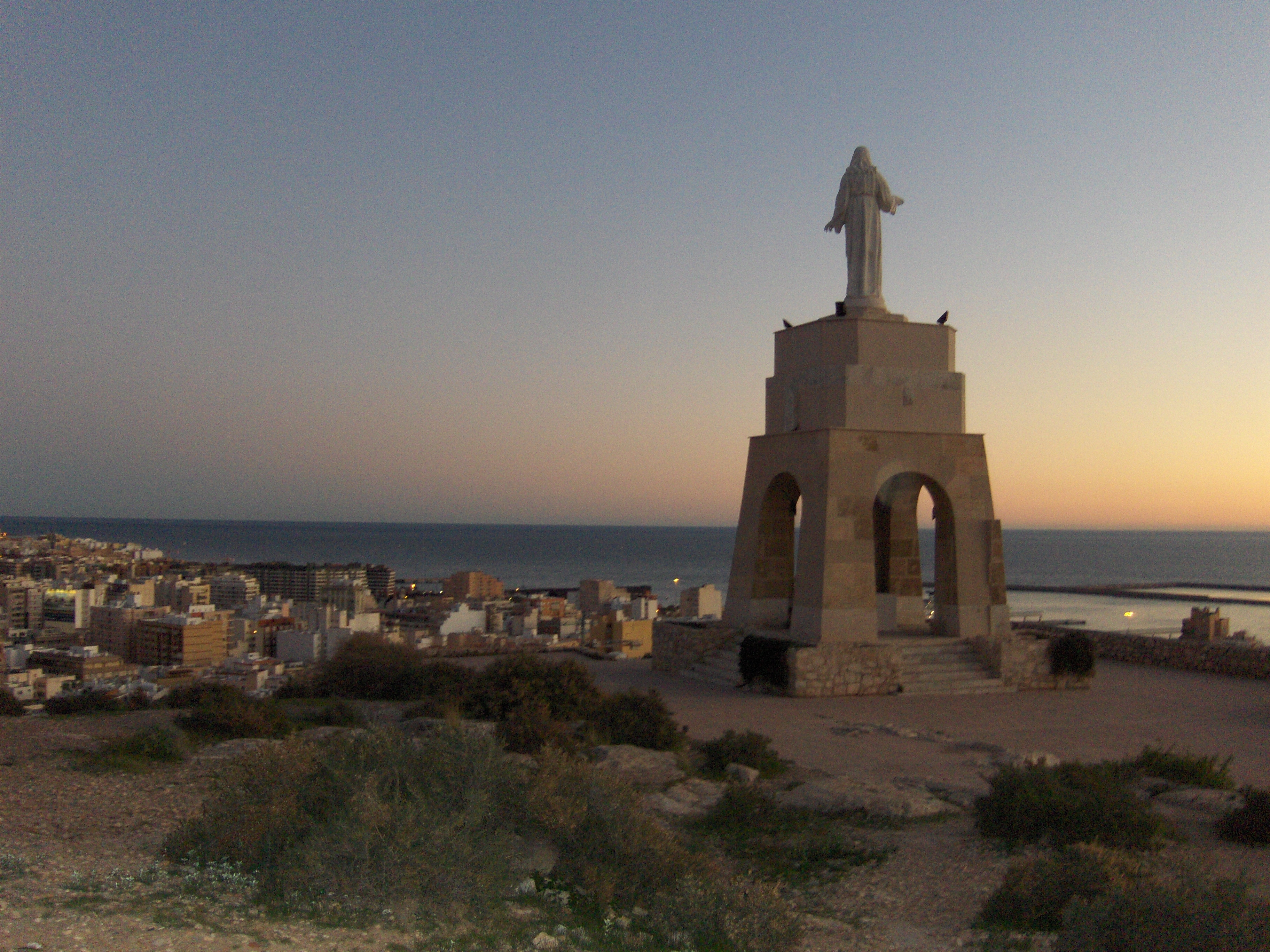 Estatua del Sagrado Corazón de Jesús en el cerro San Cristóbal, por detrás, de noche. Almería